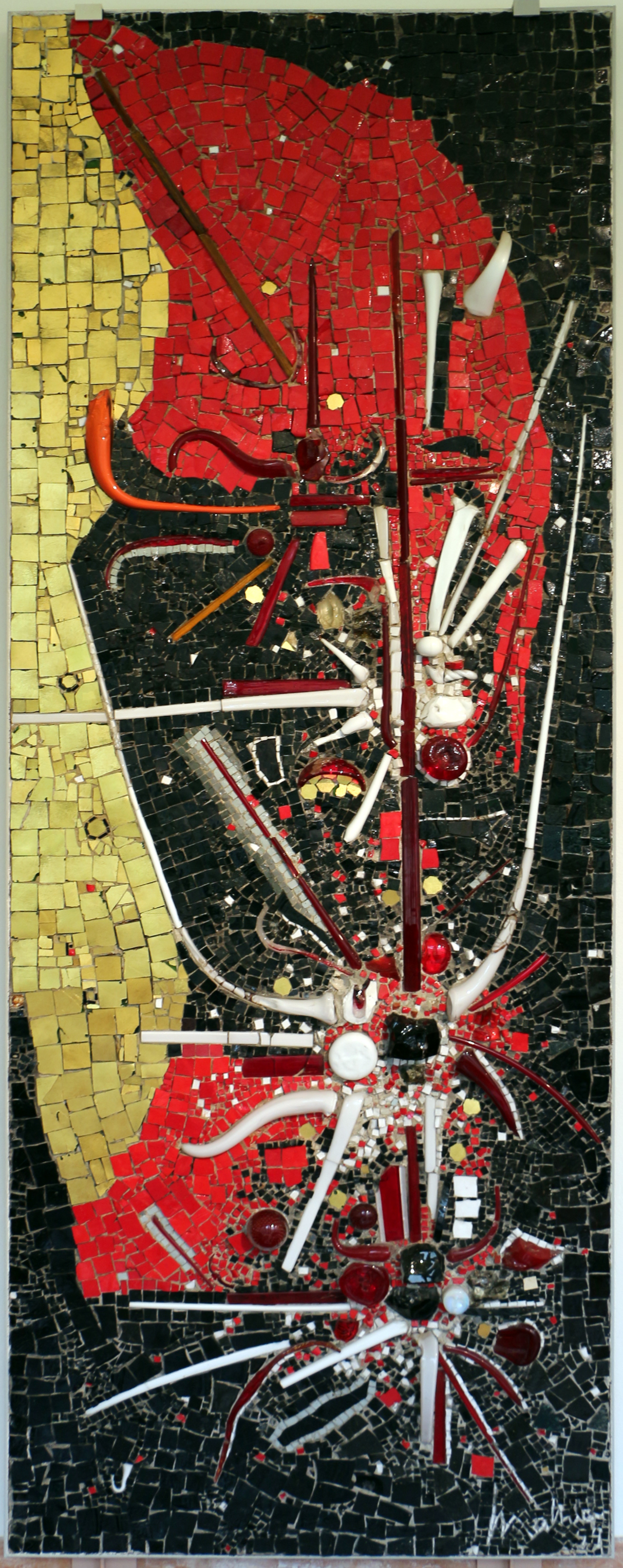 Collezione Mosaici Moderni - NB: Museum explicitly authorized the upload of its contemporary art collection for WLM 2016 (for further info ask WLM Italy organizators). This is a photo of a monument which is part of cultural heritage of Italy.